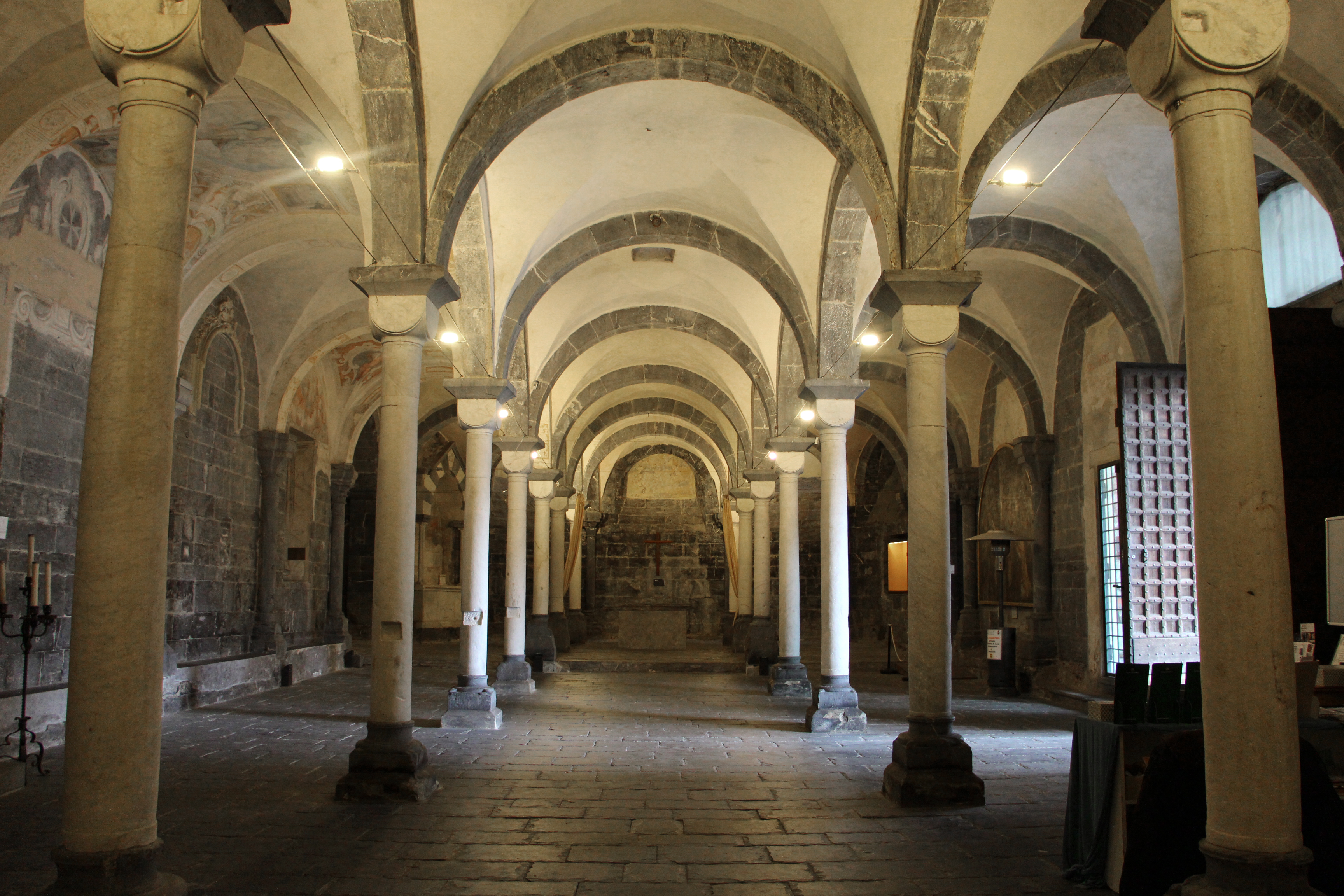 Commenda di San Giovanni di Pré